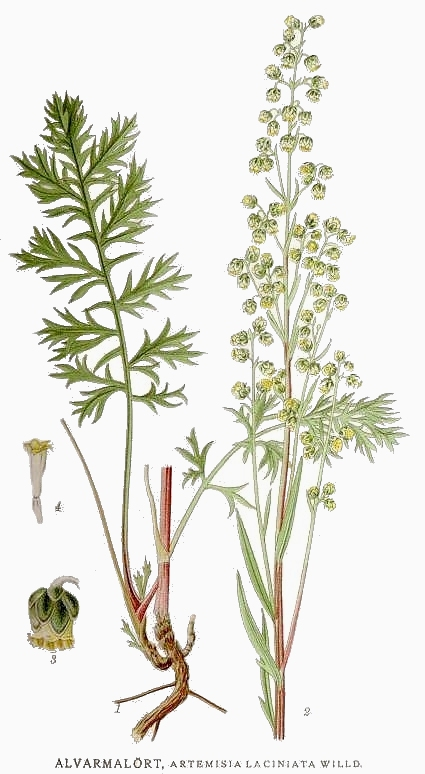 Artemisia laciniata Willd., syn. Artemisia oelandica (Besser) Kom., Artemisia laciniata auct. Original Description Alvarmalört, Artemisia laciniata Willd.